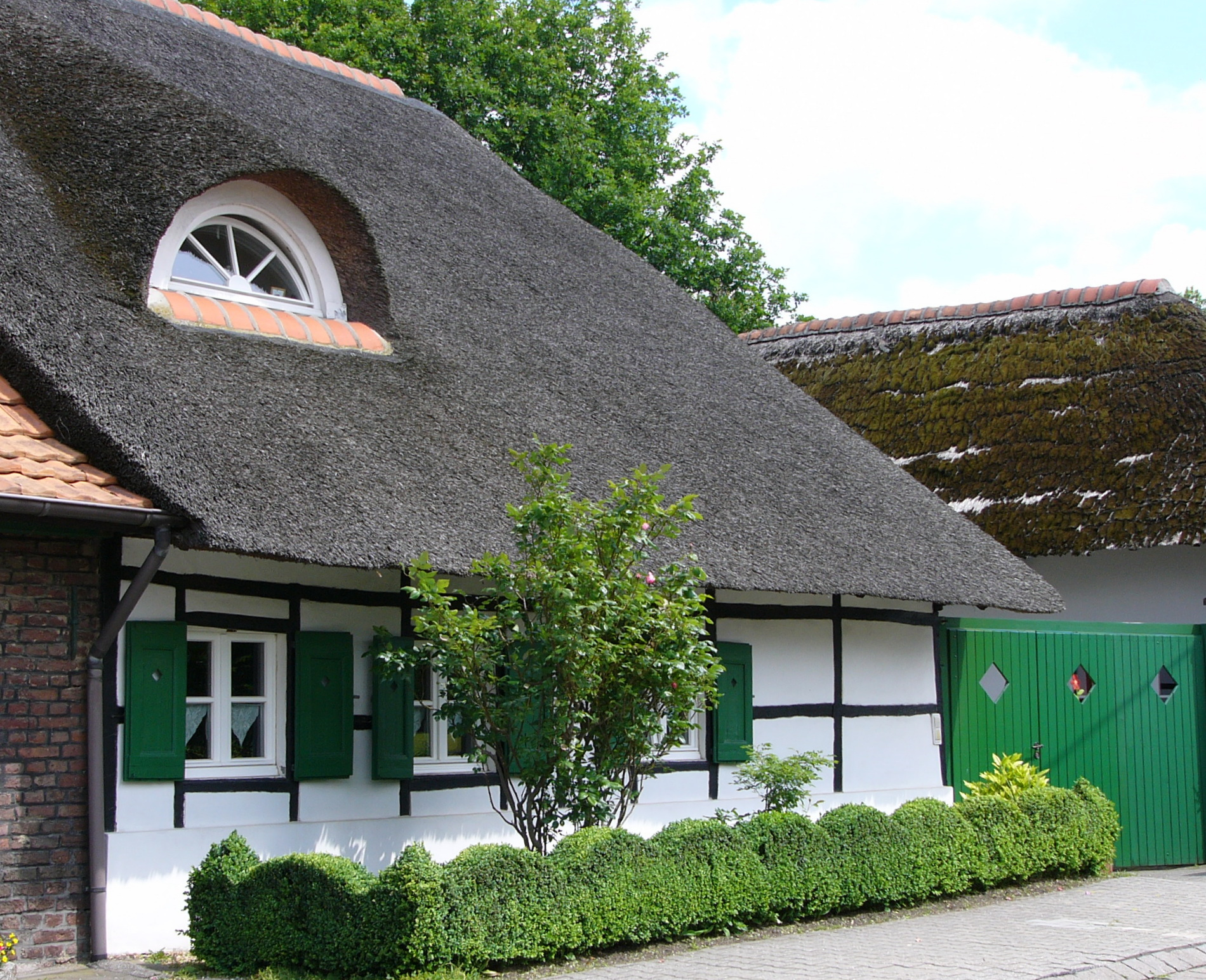 Reetgedecktes Haus in Schwaam